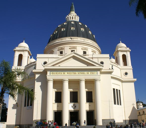 Basílica nuestra señora de Itati